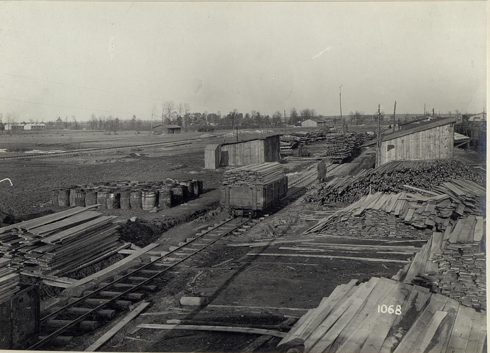 Etappenstationen und Verladebahnhöfe der vierten k.u.k. Armee wahrscheinlich in der Umgebung von Kowel